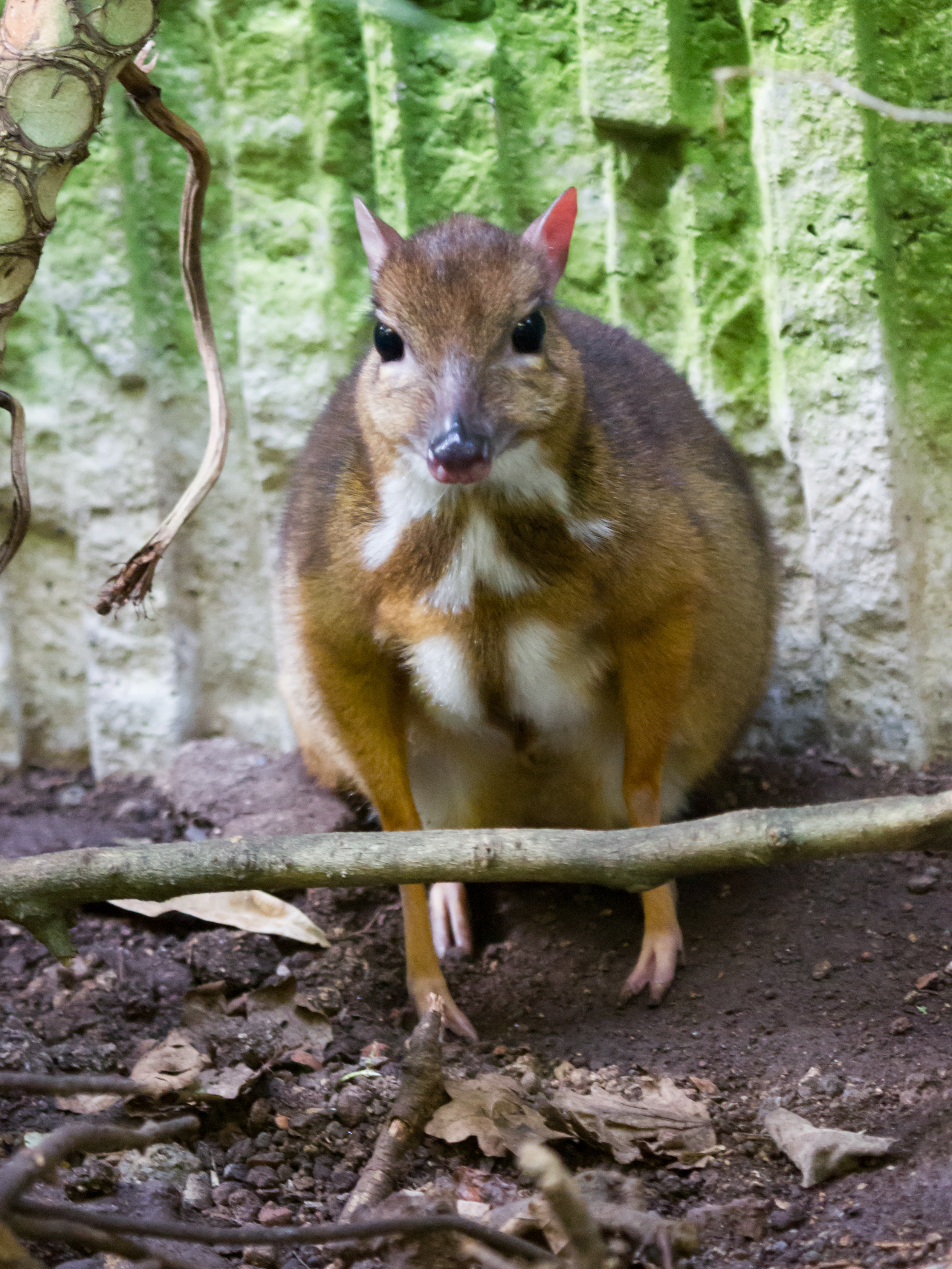 Kleinkantschil (Tragulus javanicus) von vorn im Zoo Zürich